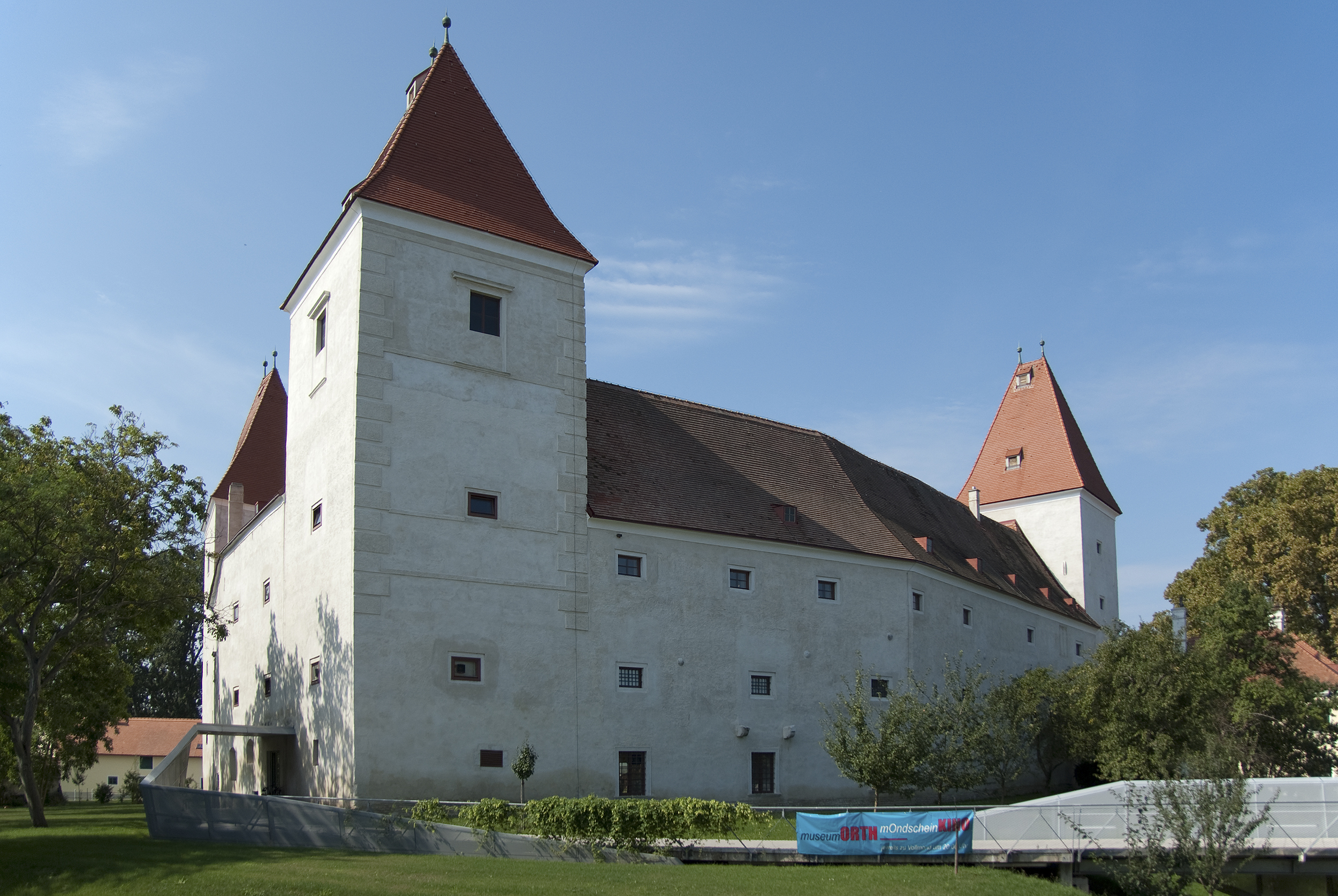 Orth – Schloss Dieses Bild wurde anlässlich des österreichischen Tags des Denkmals 2014 in Niederösterreich eingereicht.